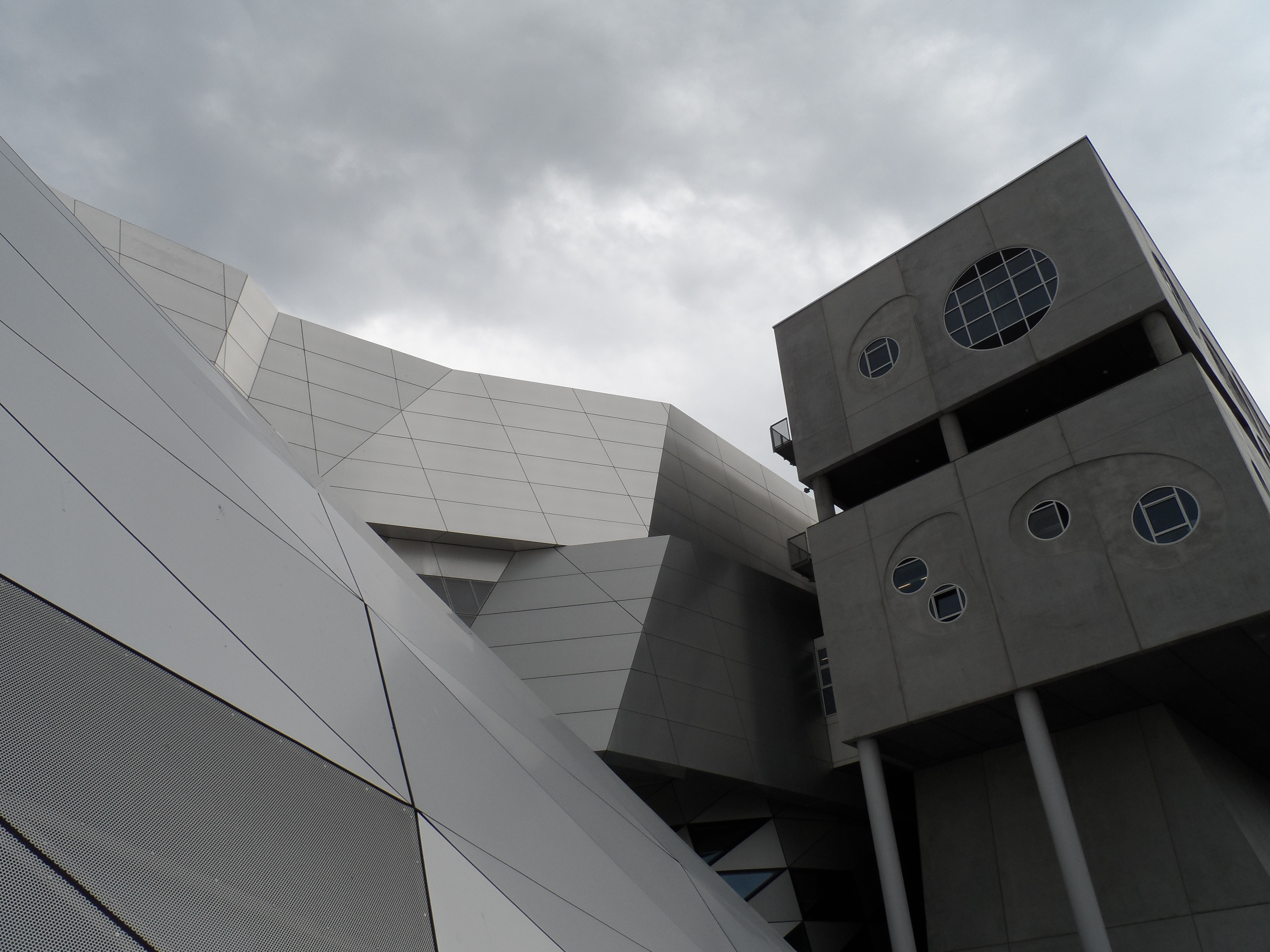 Musikkens Hus, Glanzlicht nordischer Architektur in Aalborg, Dänemark